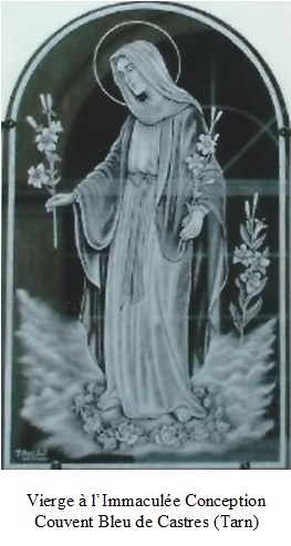 J'ai réalisé cette Vierge aux Lys en gravure sur granit Marlin pour le Couvent Bleu de Castres (Tarn)